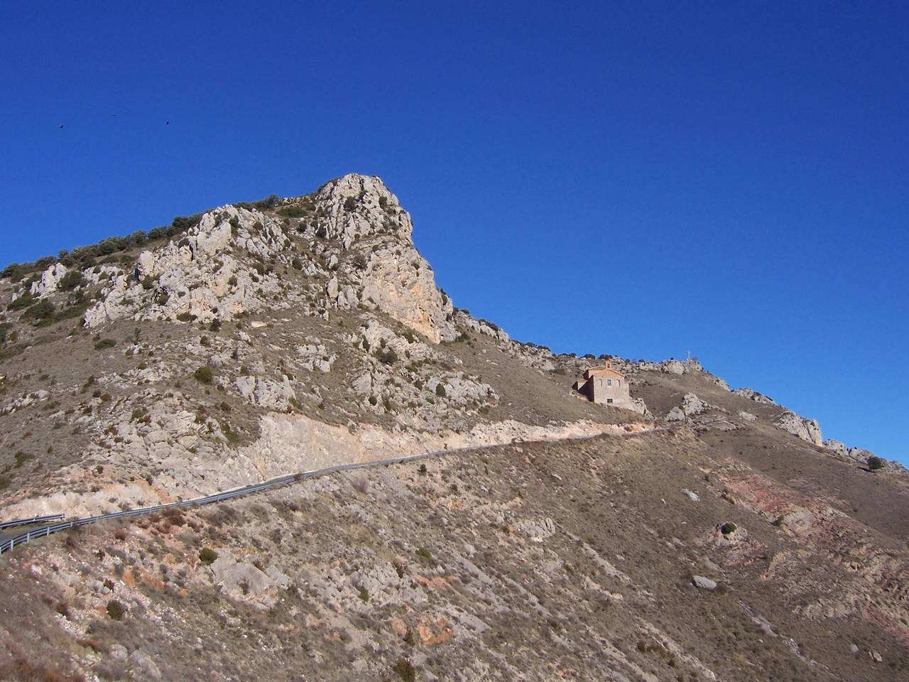 Monte Laturce donde se encuentra una cruz y la Real Basílica de Santiago